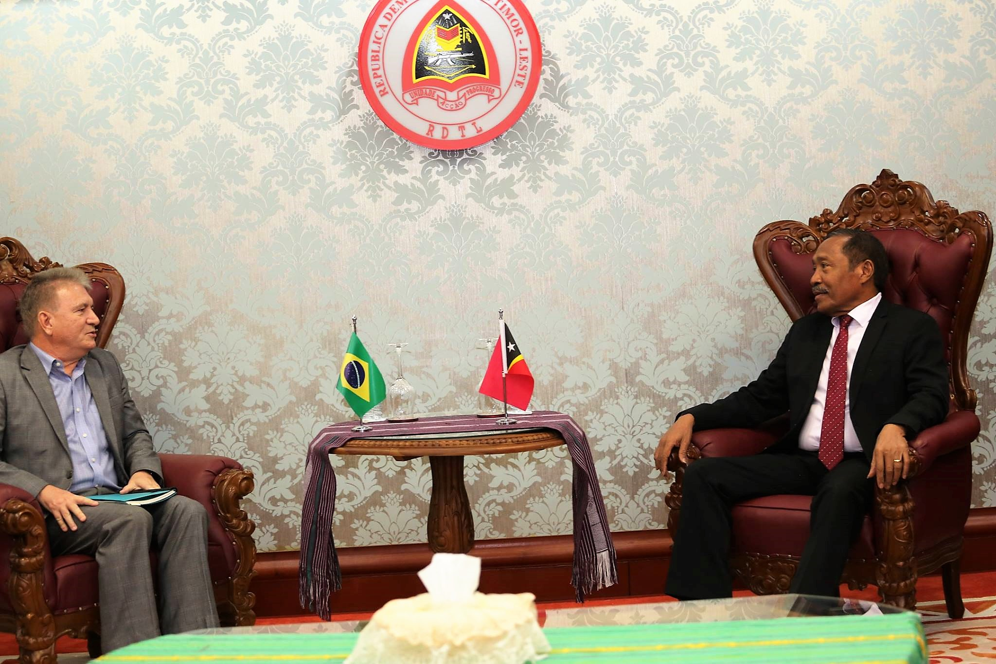 Brasiliens Botschafter Aldemo Serafim Garcia Júnior trifft Osttimors Verteidigungsminister Filomeno Paixão